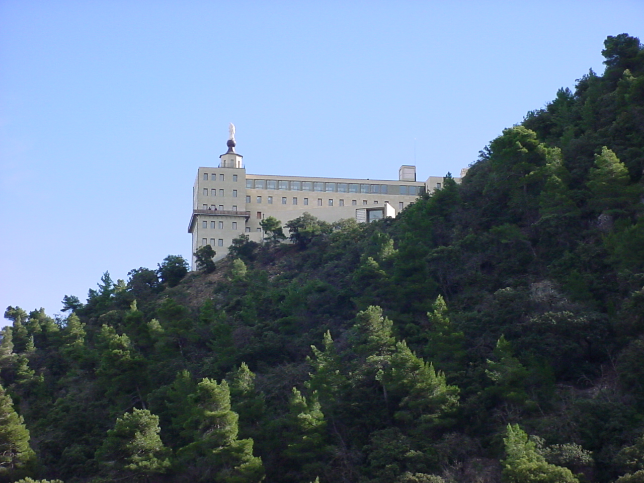 Santuario de la Font Roja (Alcoy)